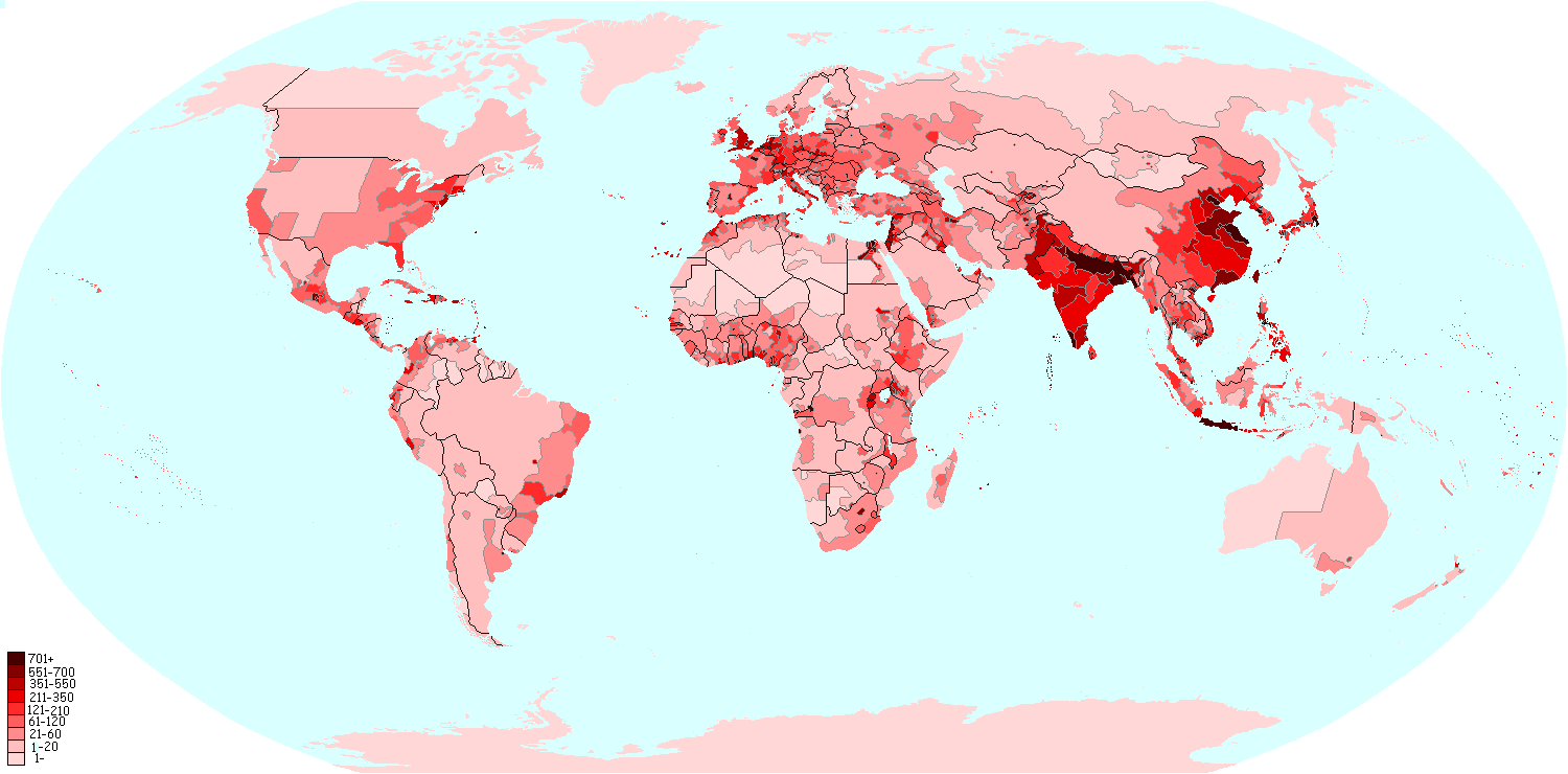 Mapa gęstości zaludnienia na świecie według jednostek administracyjnych.